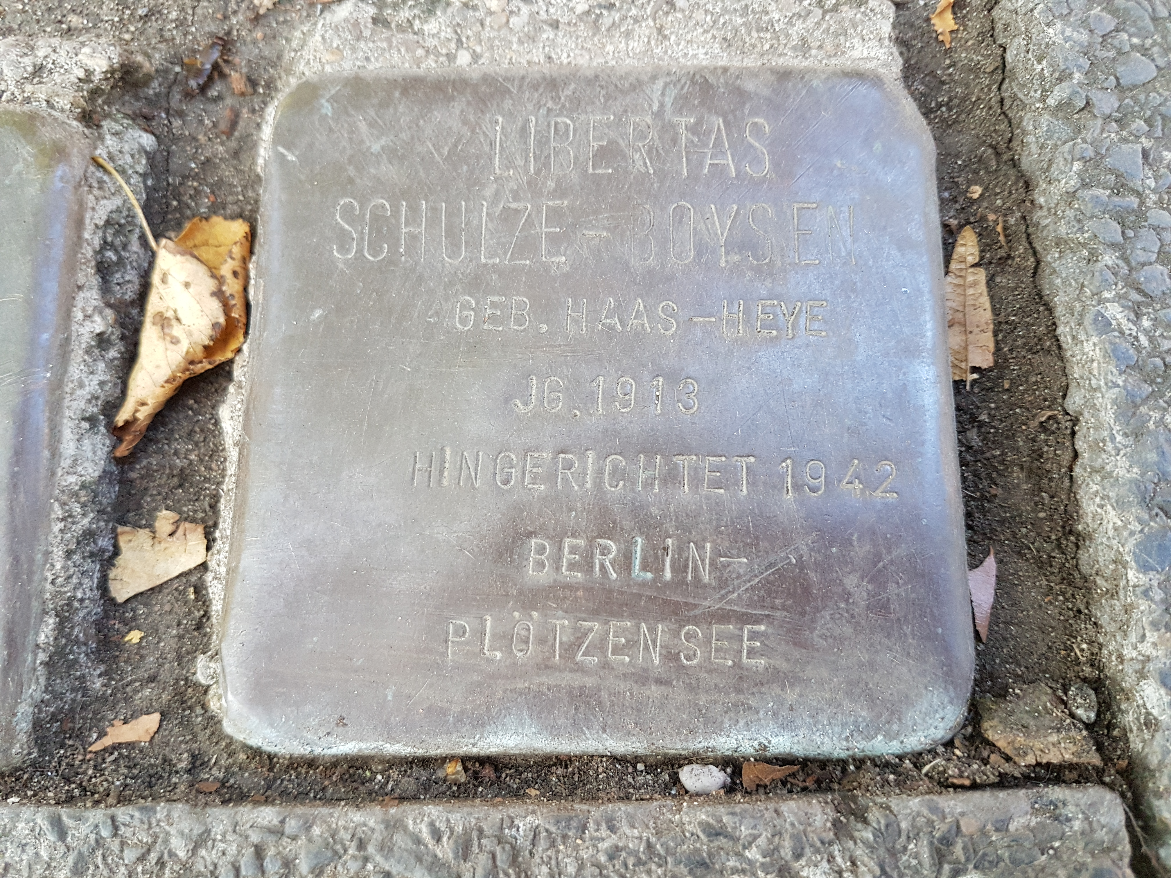 Stolperstein Duisburg Libertas Schulze-Boysen